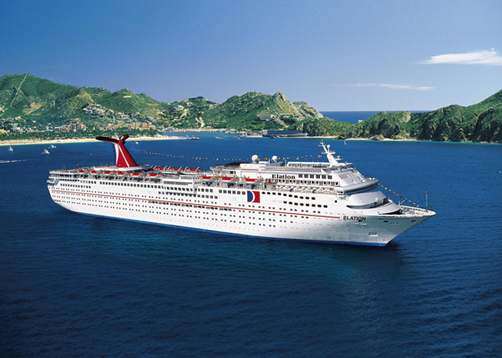 Le navire carnival elation